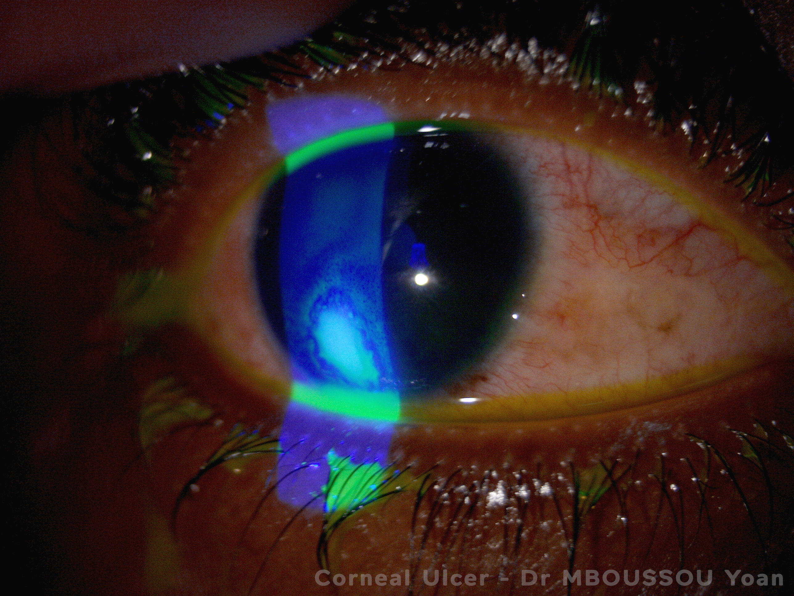 Ulcère cornéen secondaire à une kératite bactérienne chez un sujet mélanoderme